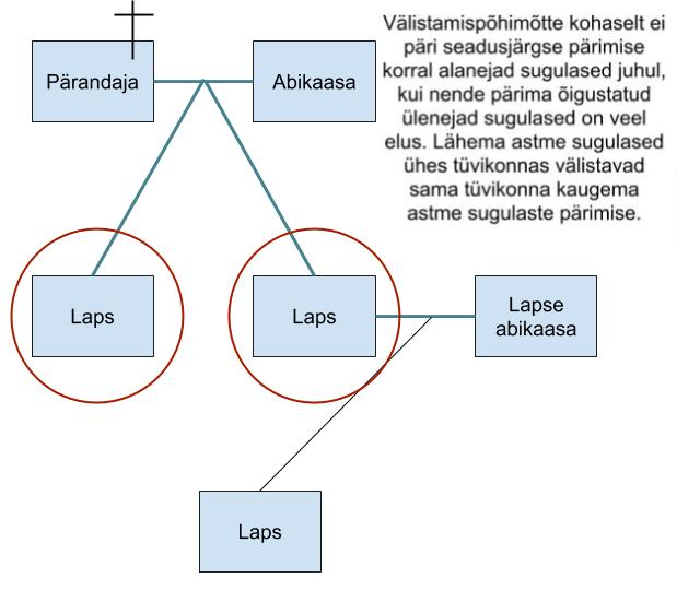 Välistamispõhimõte